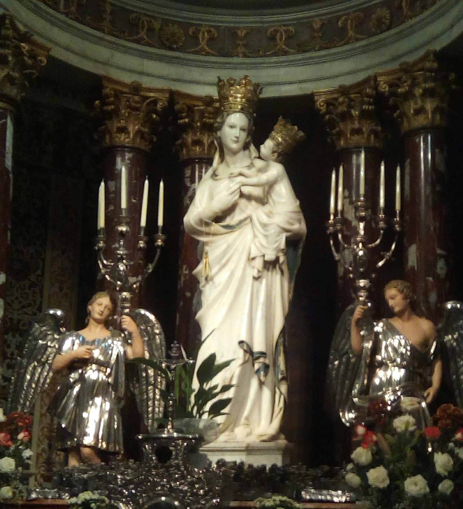 Statua della Madonna di Trapani. Opera di Nino Pisano. Santuario dell'Annunziata, Trapani